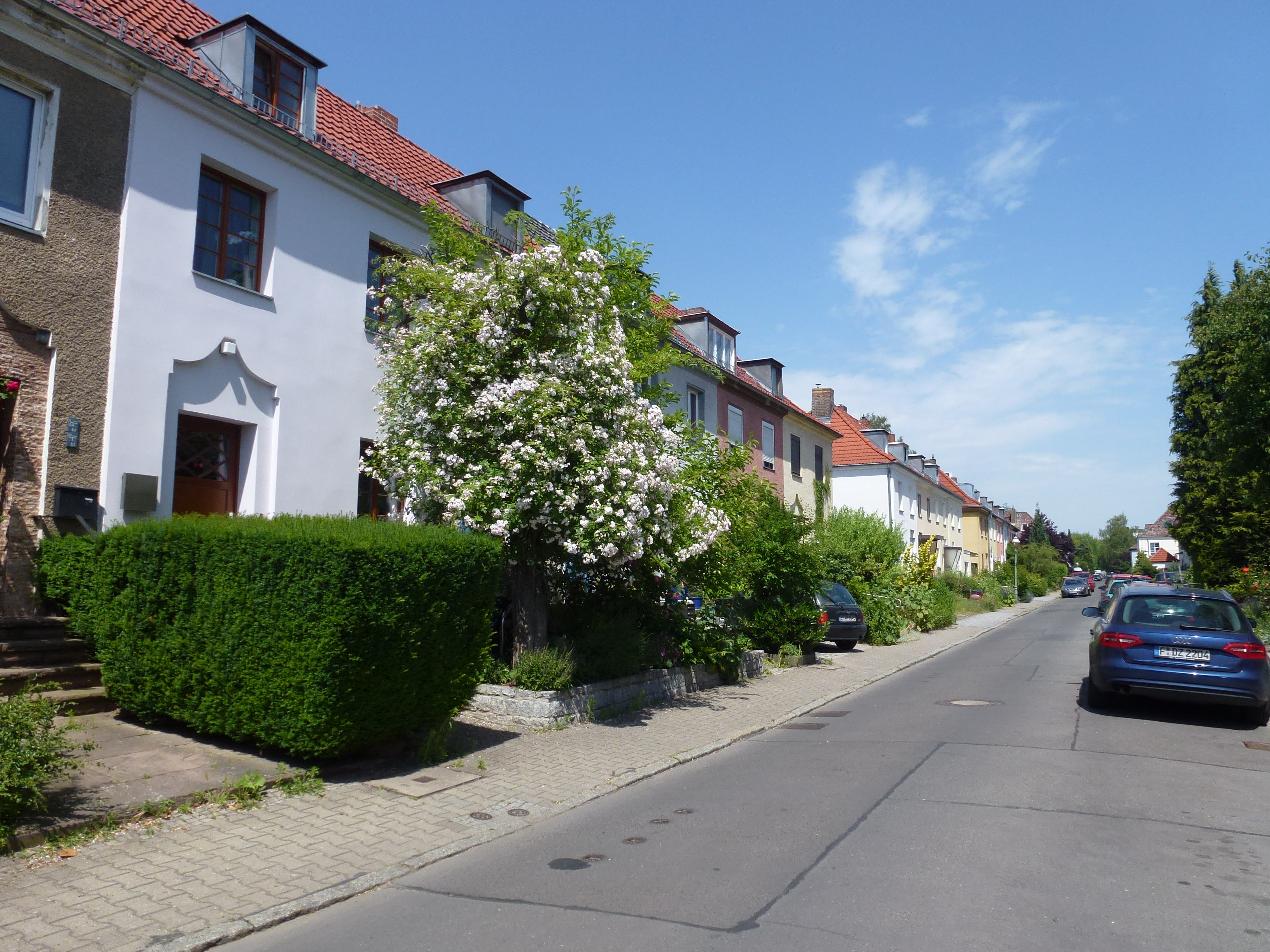 Berlin-Tempelhof Leonhardyweg